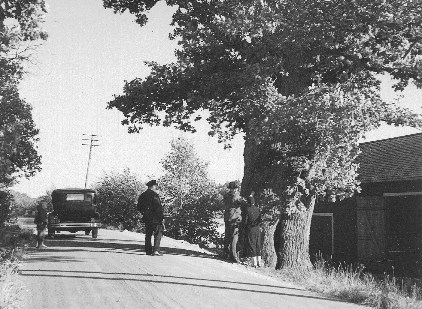 Hagstaeken, fridlyst 10 oktober 1933. Mannen vid eken kan vara Rutger Sernander i färd med att spika fridlysningsplaketten på stammen. Vägen är nuvarande gång- och cykelväg intill Glömstavägen.